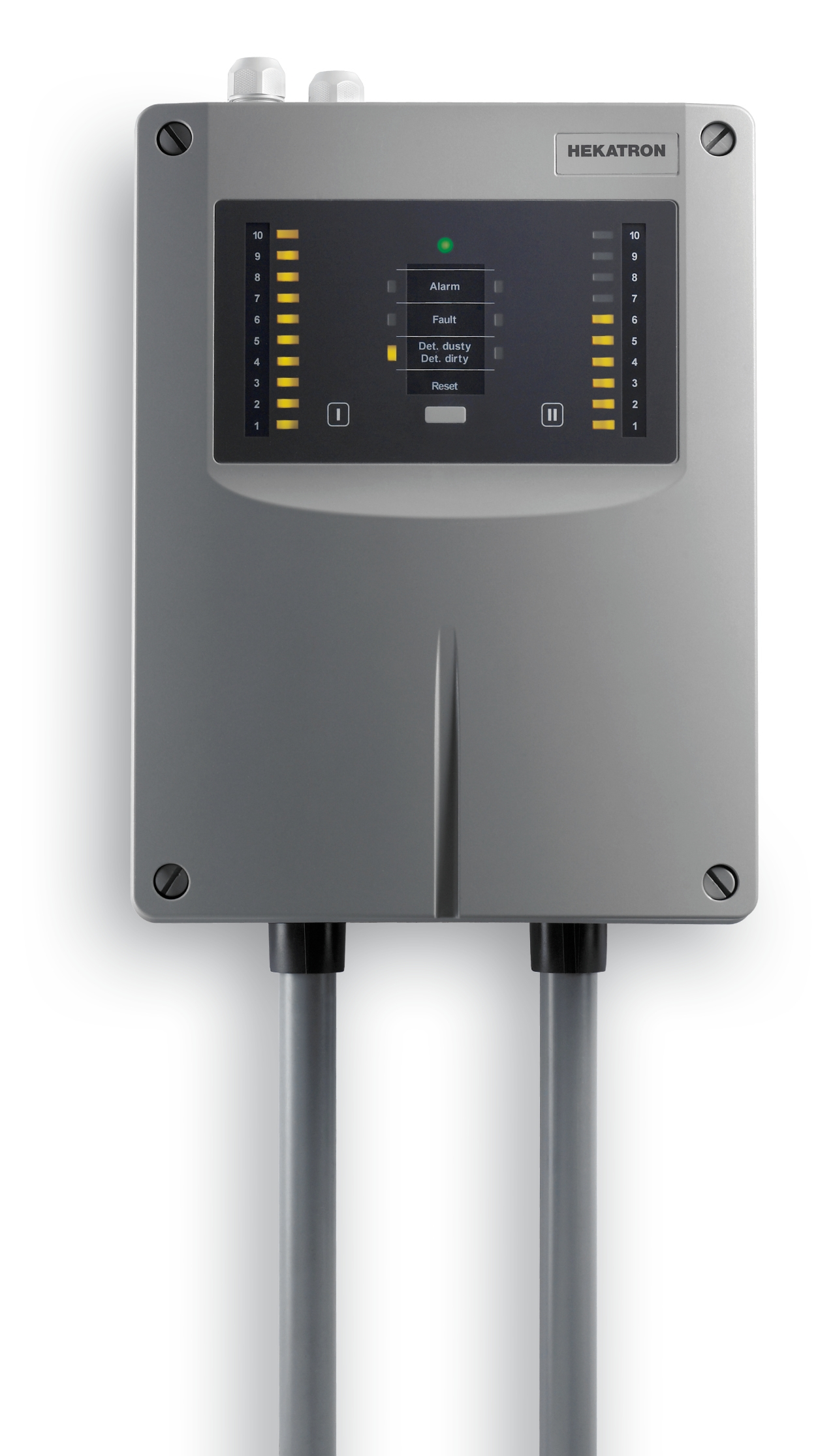 Ansaugrauchmelder ASD 535